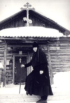 Poustinia